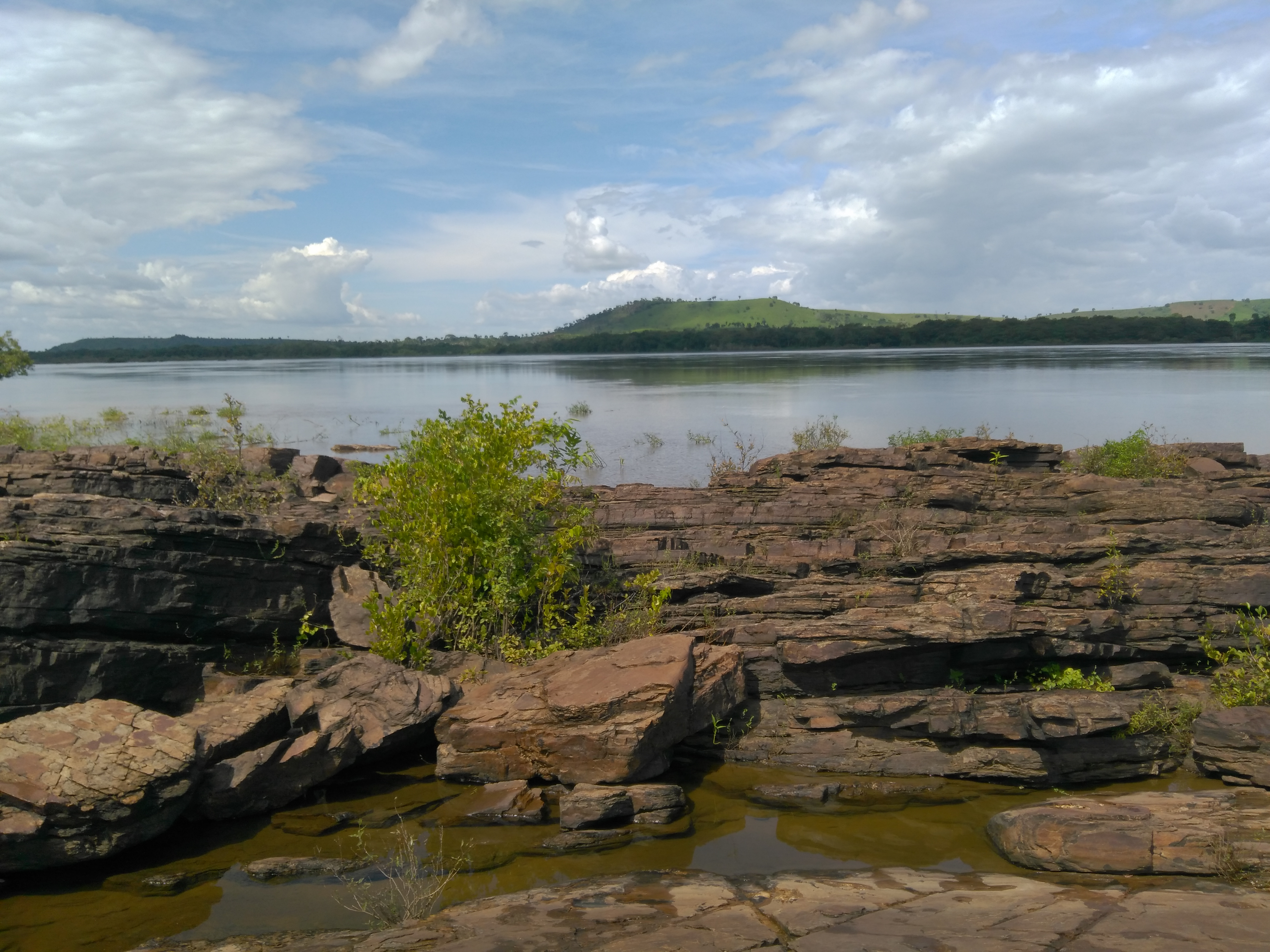 pedreiras as margens do rio.